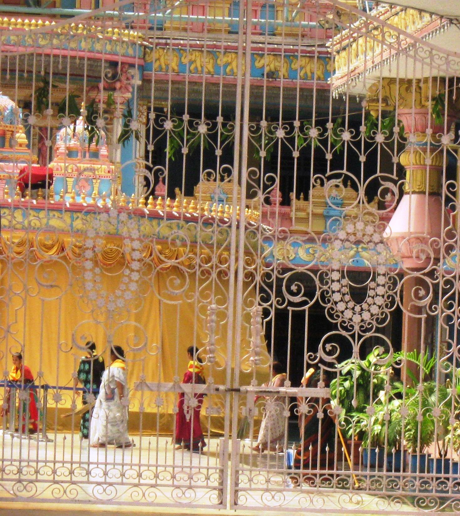 Photograph of Sathya Sai Baba Samadhi at Puttaparthi, India